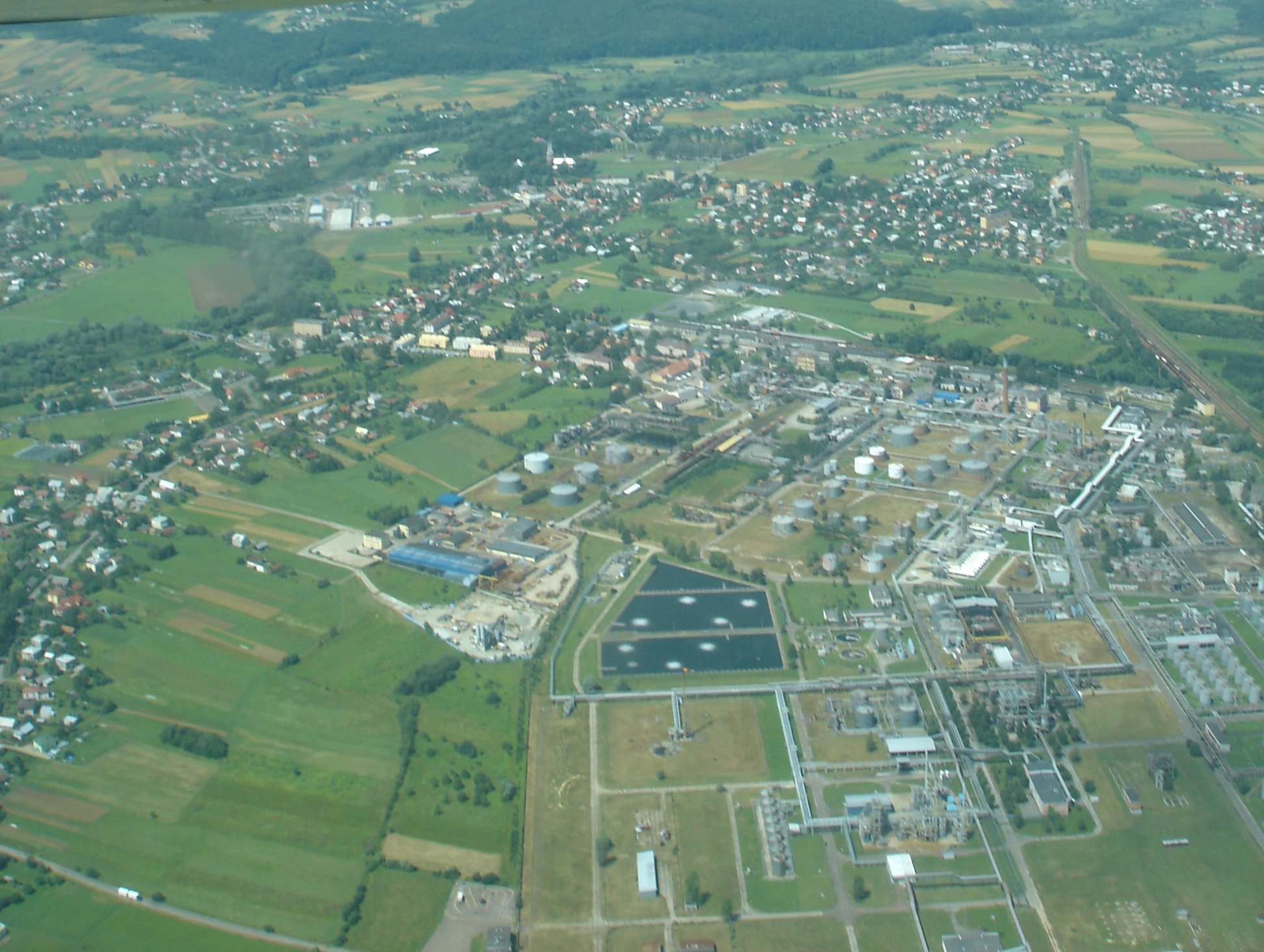 Jedlicze